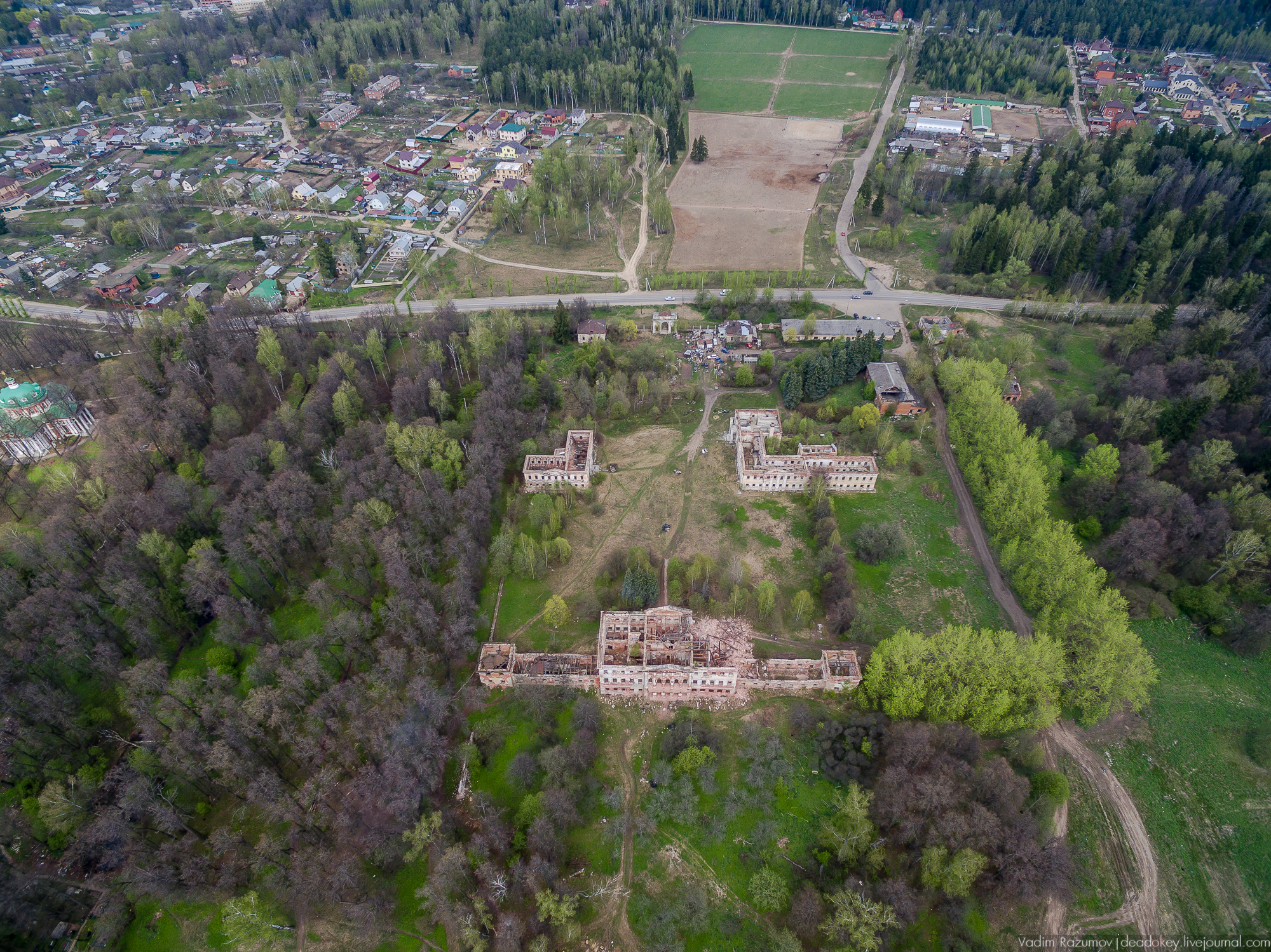 Усадьба «Гребнево» (Бибиковых, Голицыных): Гребнево, Щёлковский район, Московская область Фотография сделана на следующий день после обрушения части главного дома. Сейчас в усадьбе планируют начать противоаварийные работы.